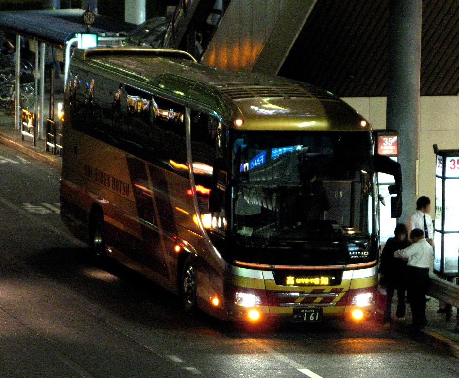 高知県交通 高知200か161 夜行高速バス「ブルーメッツ号」に使用される。新宿駅西口ペデストリアンデッキ上から撮影。